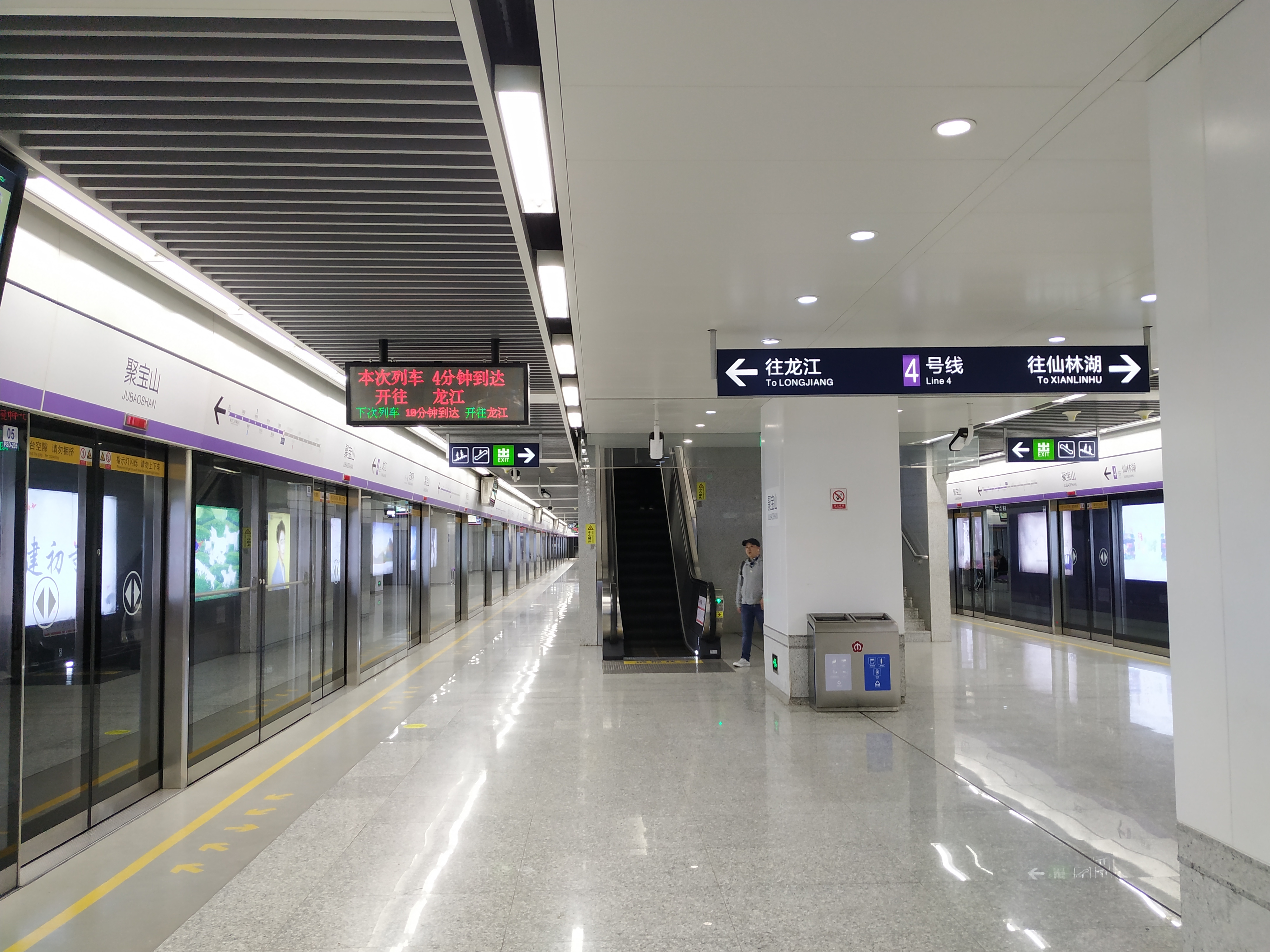 中文（中国大陆）: 南京地铁4号线聚宝山站